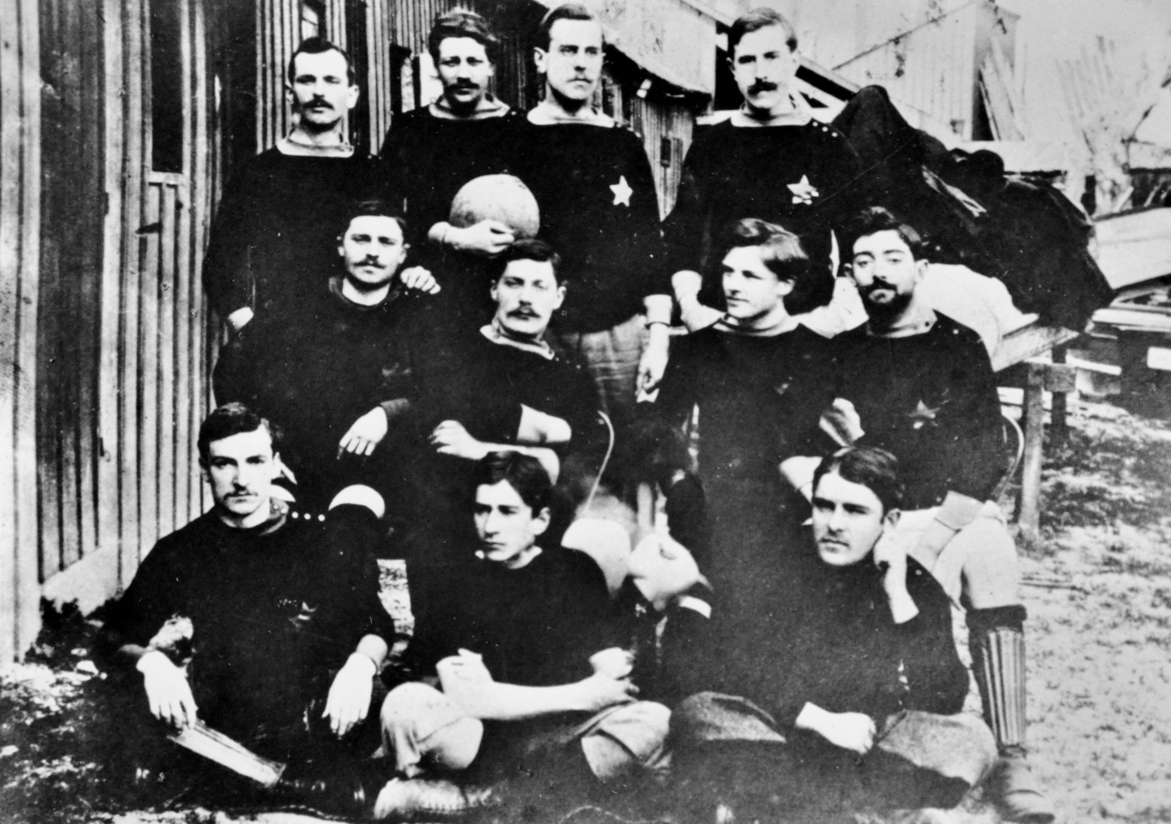 Equipe de l'Association des Etudiants de Caen en 1899, André Détolle futur maire (en bas à gauche) et Leboucher(en haut, à droite)